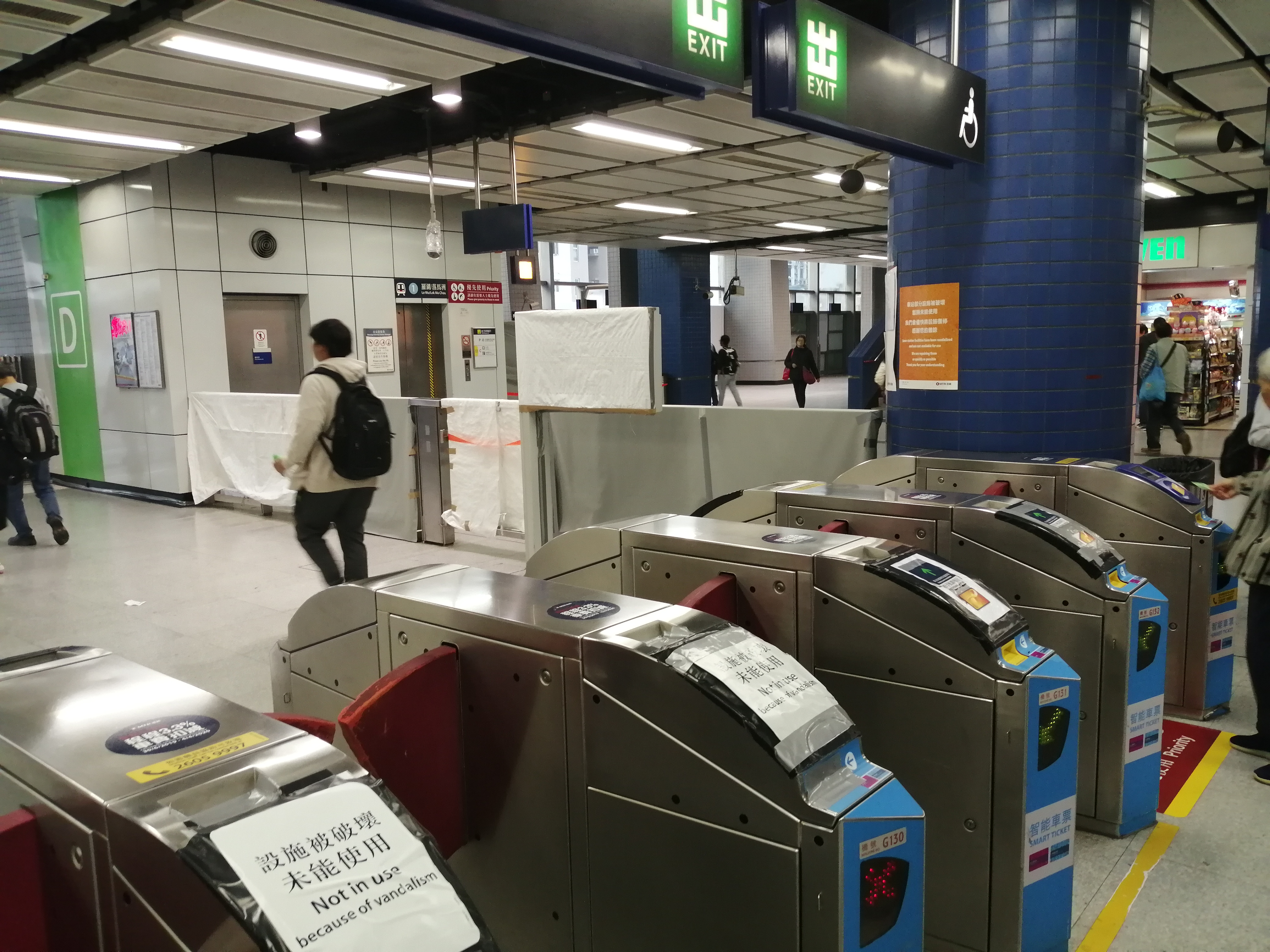 中文（香港）: 大圍站遭到破壞的閘機、玻璃欄杆和顯示屏